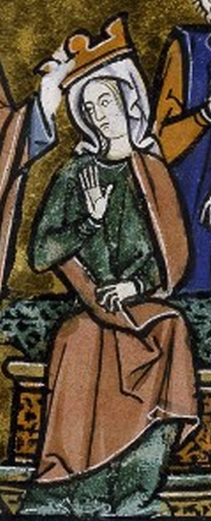 Couronnement de Melisende